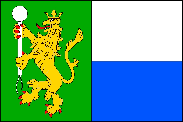 Vlajka obce Hamry (okres Klatovy)